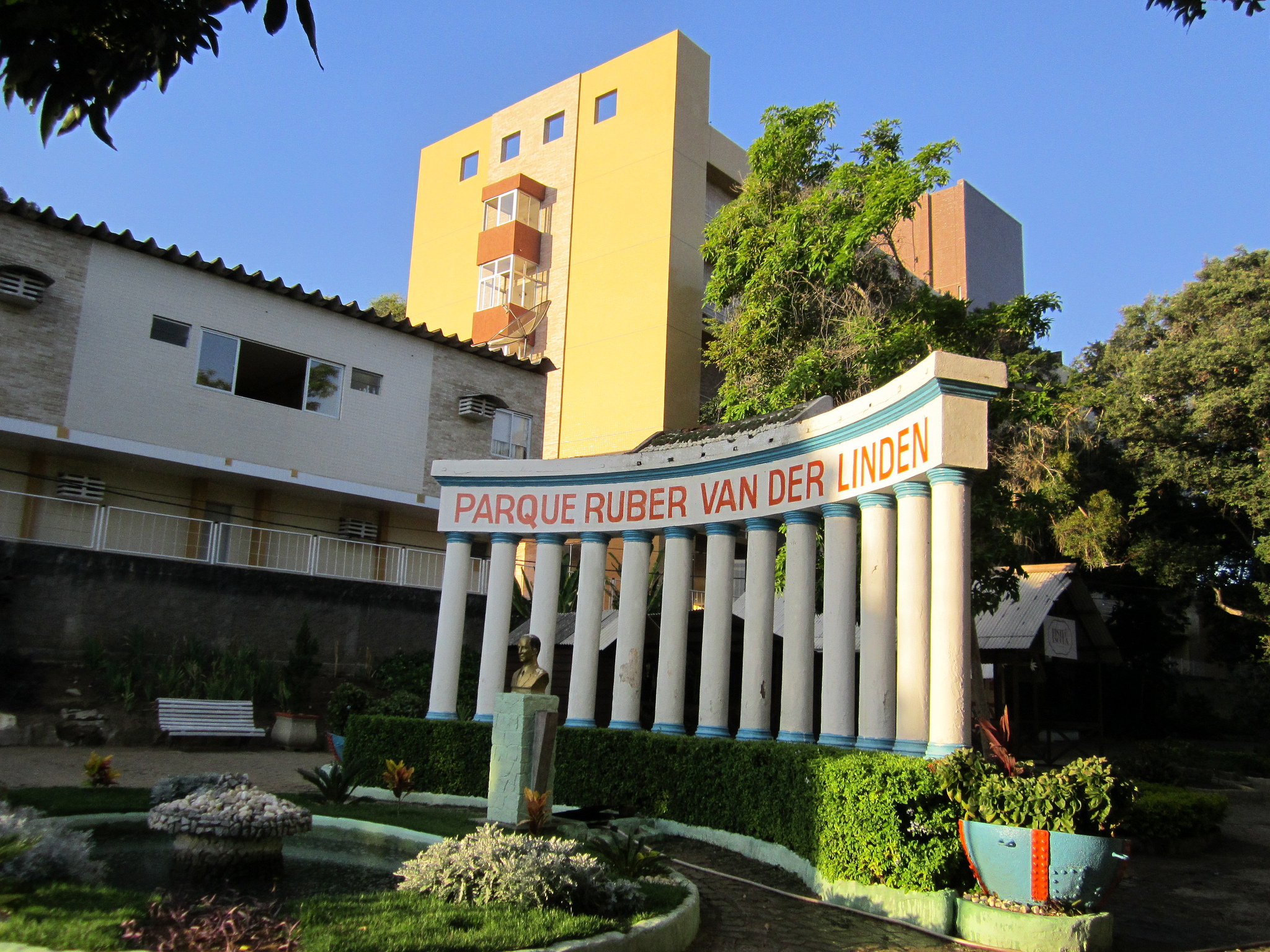 Parque Ruber Van Der Linden - Garanhuns, Pernambuco, Brasil